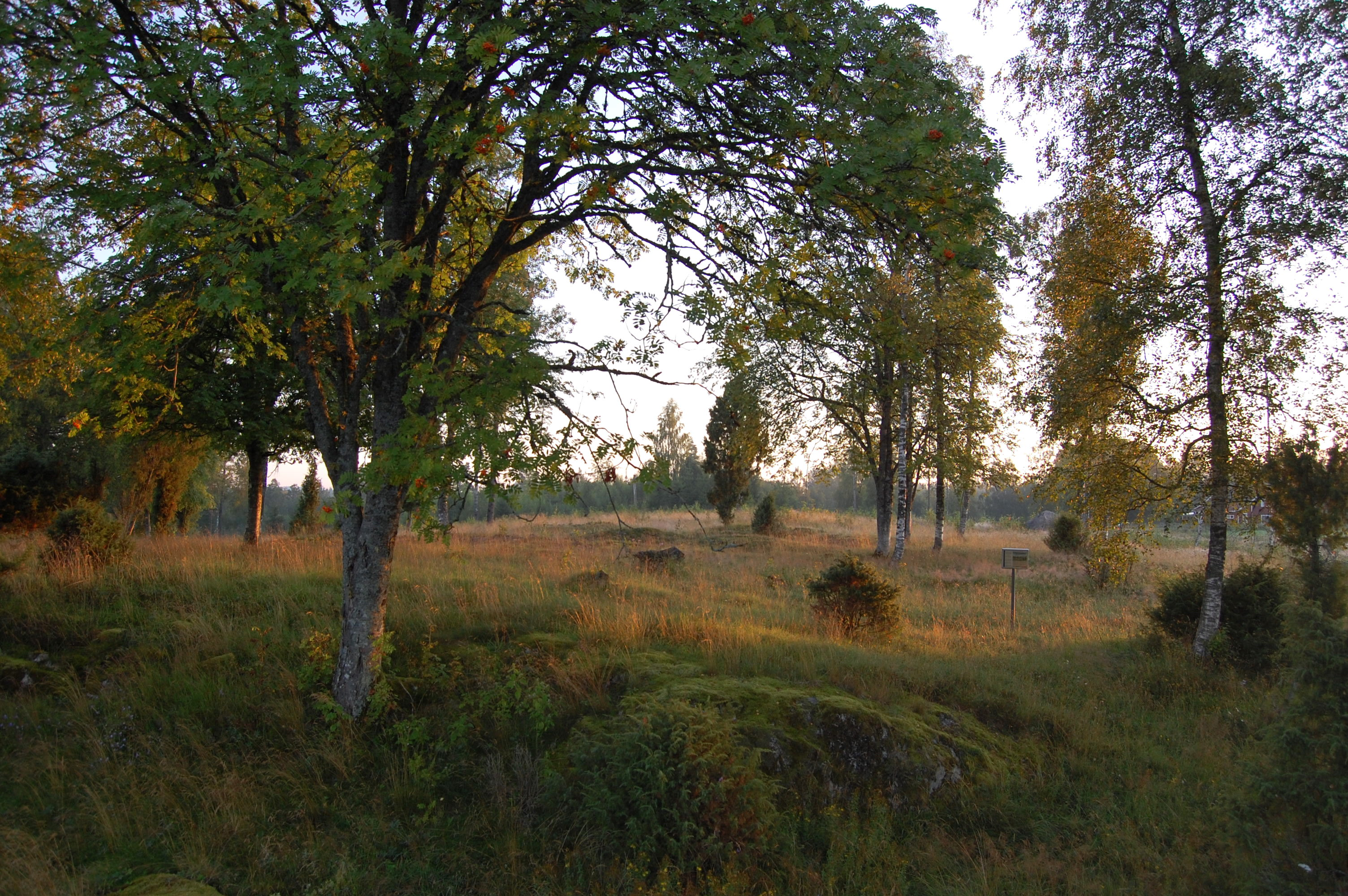 Blick über das Gräberfeld von Hylletofta